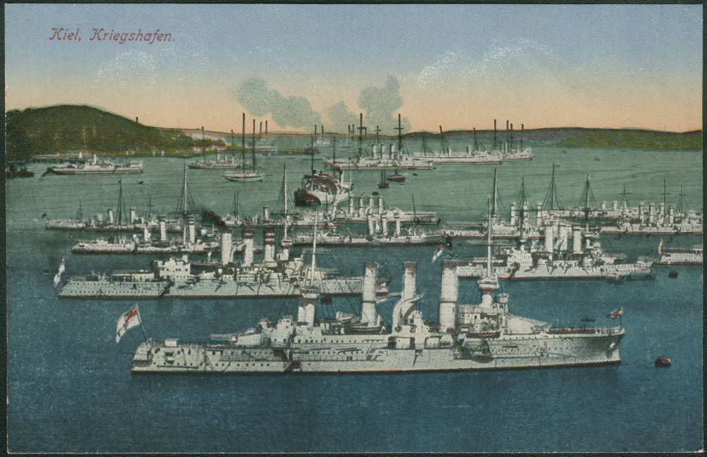 Kieler Kriegshafen